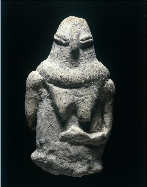 The Yarmukian Culture is a Neolithic culture of the ancient Levant. It was the first culture in Prehistoric Israel and one of the oldest in the Levant to make use of pottery. The Yarmukian derives its name from the Yarmouk River which flows near its type site at Sha'ar HaGolan, a kibbutz at the foot of the Golan Heights. The pictures are fromYosef Garfinkel excavations taken between 1989-1990 & 1998-2004 התרבות הירמוכית היא תרבות מהתקופה הניאוליתית הקרמית שמרבית שרידיה נתגלו באיזור שדות שער הגולן, והיא קיבלה את שמה על שם נהר הירמוך הזורם בסמוך. התמונת הן מחפירות שנערכו בשער הגולן על ידי הארכאולוגי יוסי גרפינקל מהאוניברסיטה העברית . נערכו 2 עונות חפירה 1990-1989, ו 1996-2004. צלמית מקרמיקה